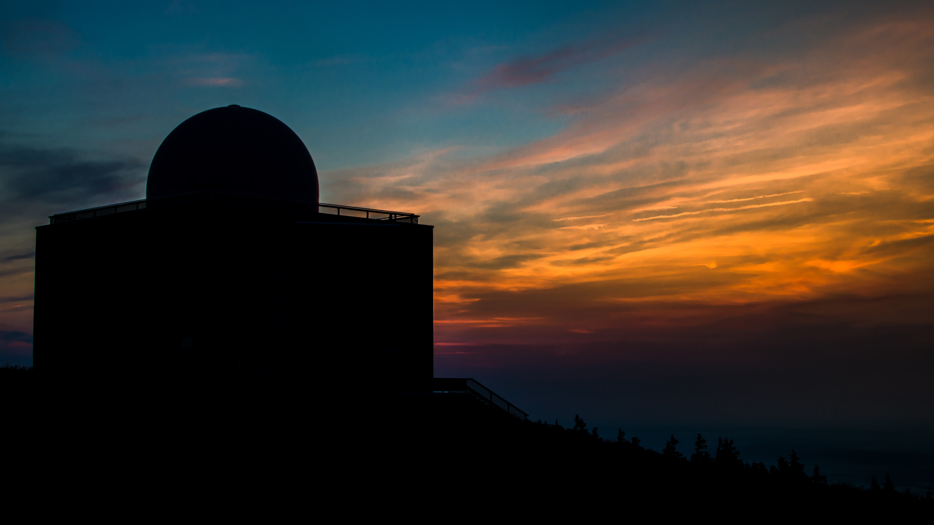 Das Brockenhaus nach Sonnenuntergang HWN 9